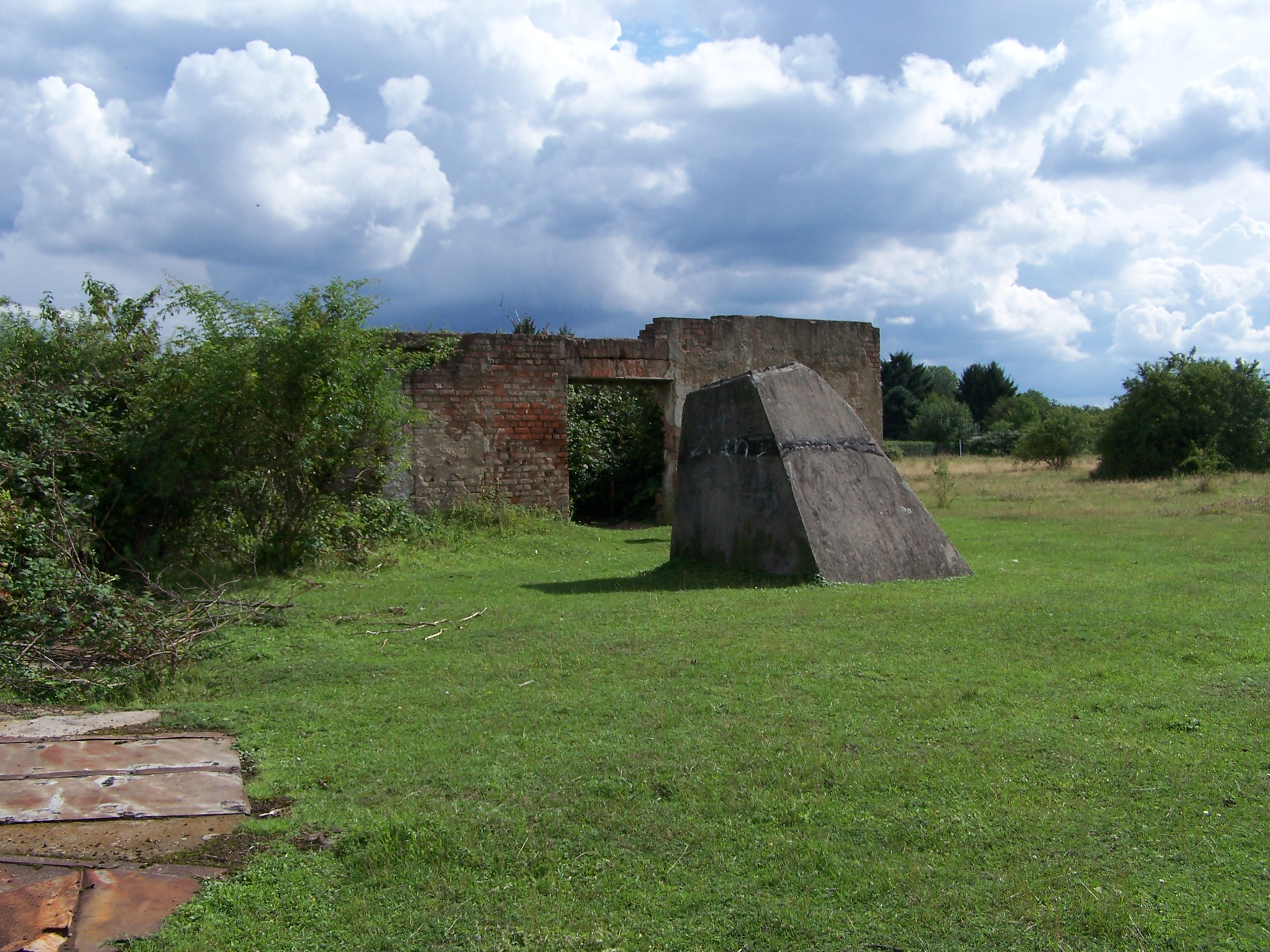 Trümmer der Sendeanlage „Radio Frankfurt“ am Heiligenstock